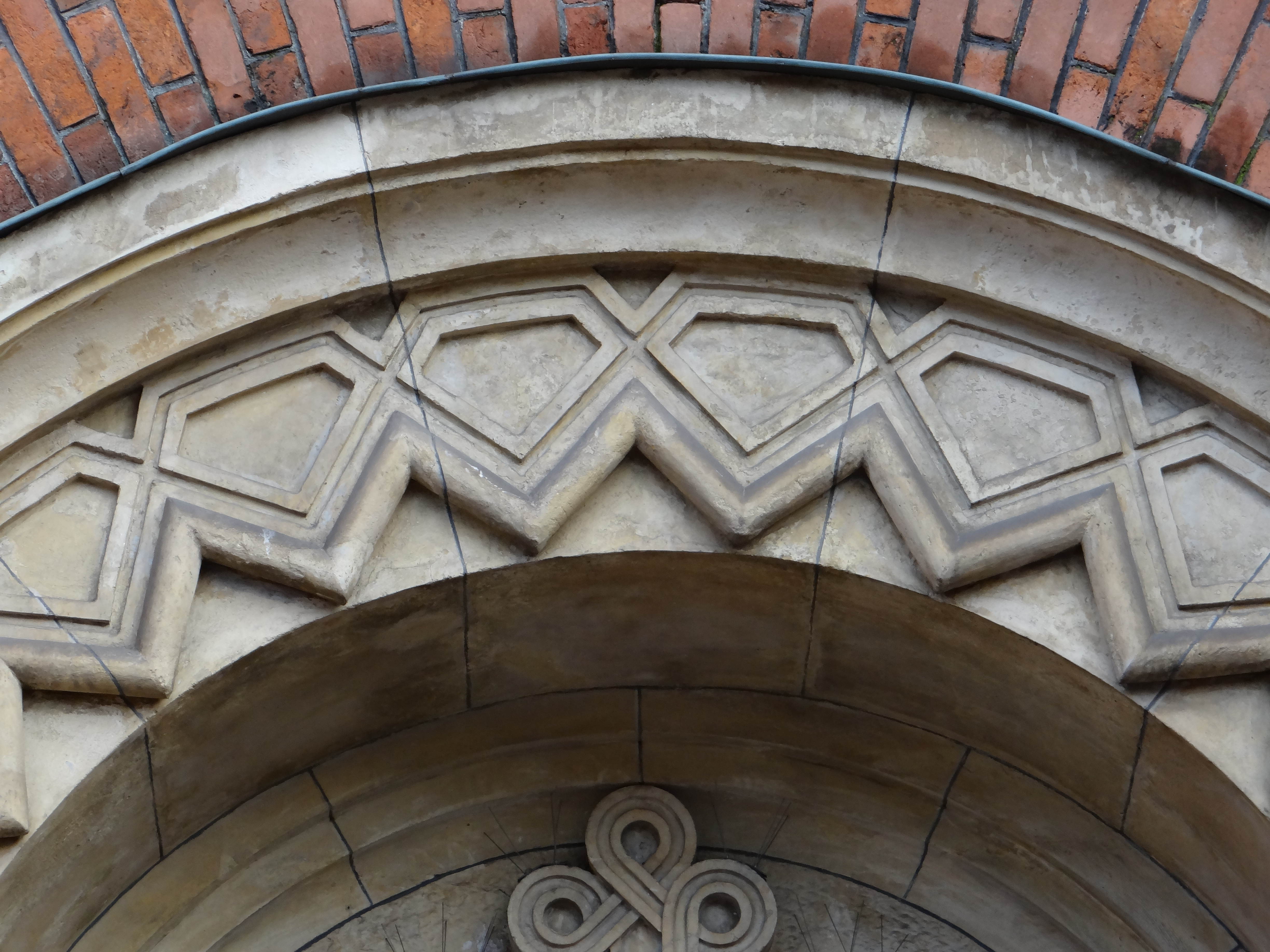 Fragment portalu w Kościele Najświętszej Maryi Panny z Lourdes w Krakowie. Ul. Misjonarska 37.